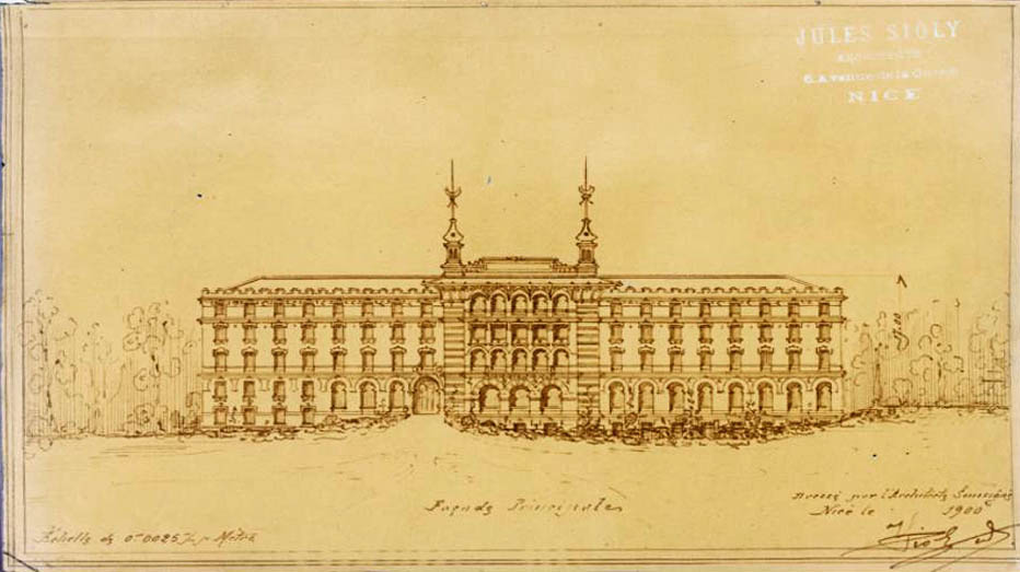 Dessin de la façade de l'hôtel Alhambra boulevard de Cimiez à Nice établi par l'architecte Sioly